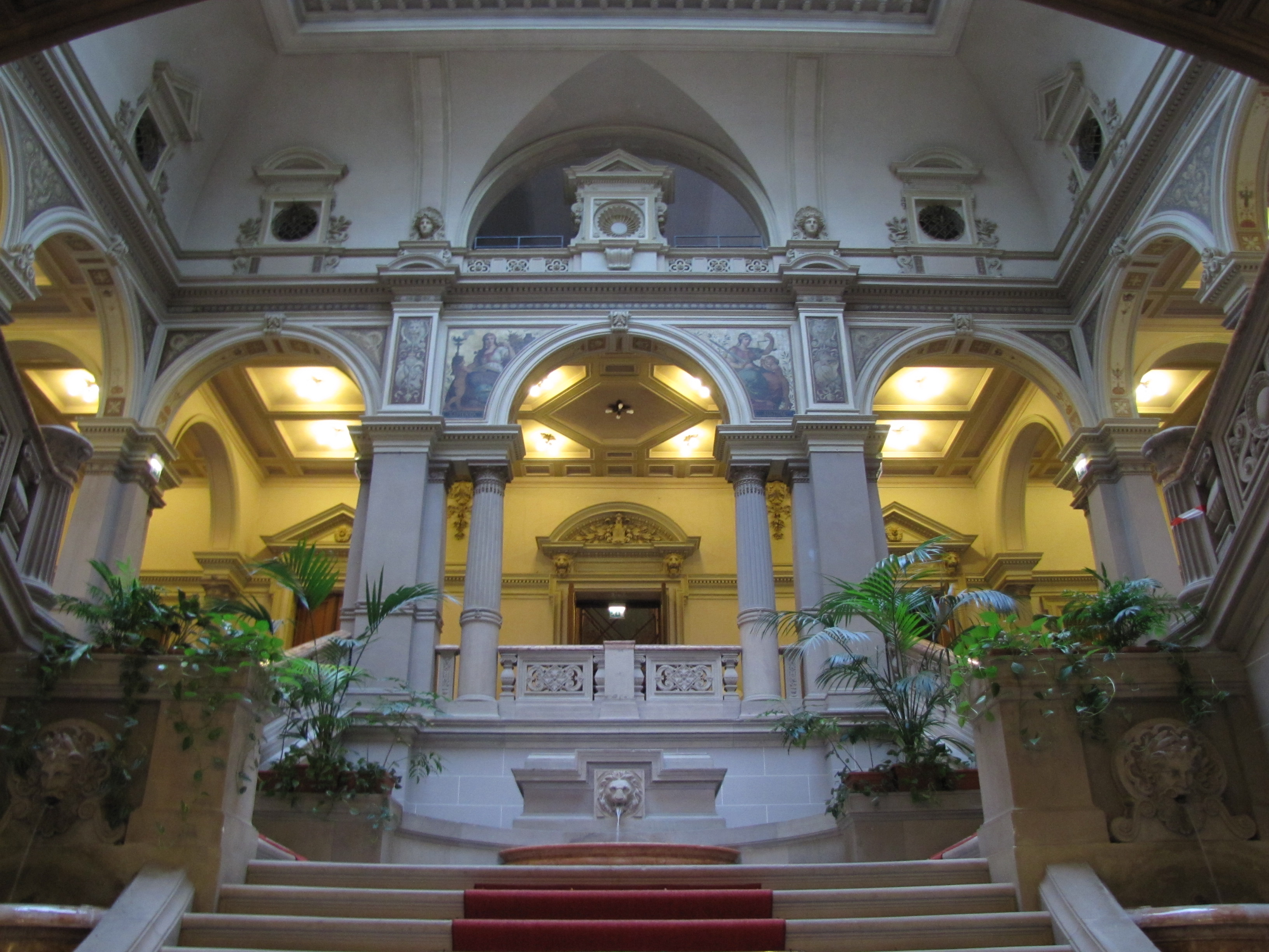 Alsace, Bas-Rhin, Strasbourg, Ancien Palais impérial allemand ou Kaiserpalatz (1888), dit Palais du Rhin, 1-2-3 place de la République: Hall d'entrée et escalier d'honneur. .